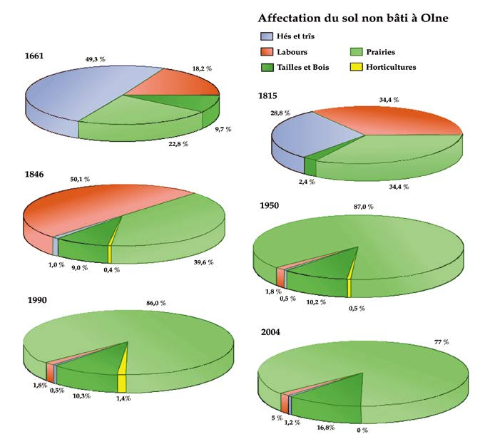 Olne sol non bati